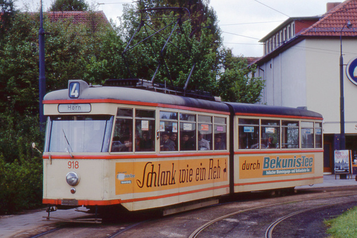 Straßenbahn Bremen, Wagen Nr. 918 (Typ GT3) am Sonntag, den 18. Mai 1963 auf der Linie 4 in der Wendeschleife Arsterdamm